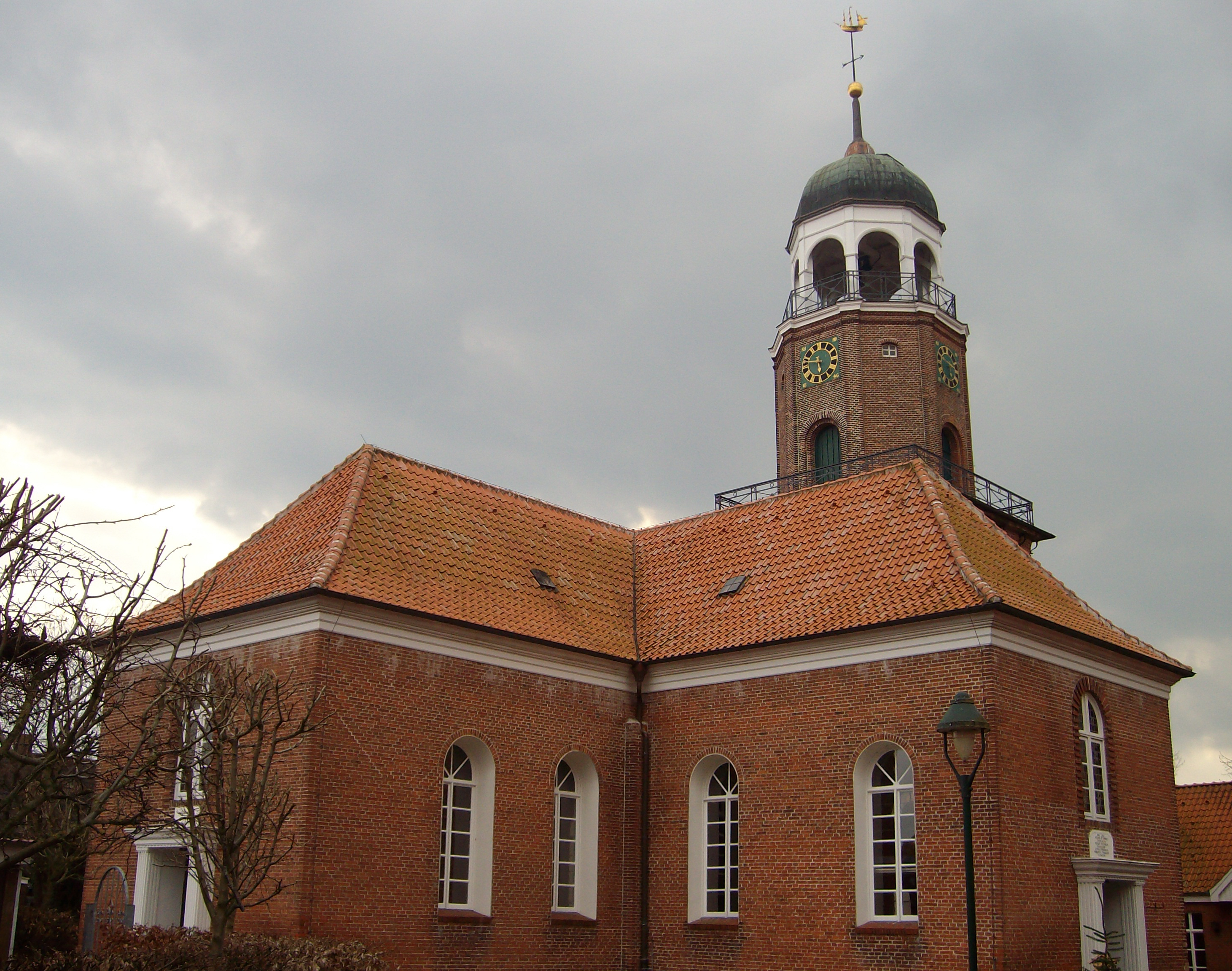 Church in Jemgum